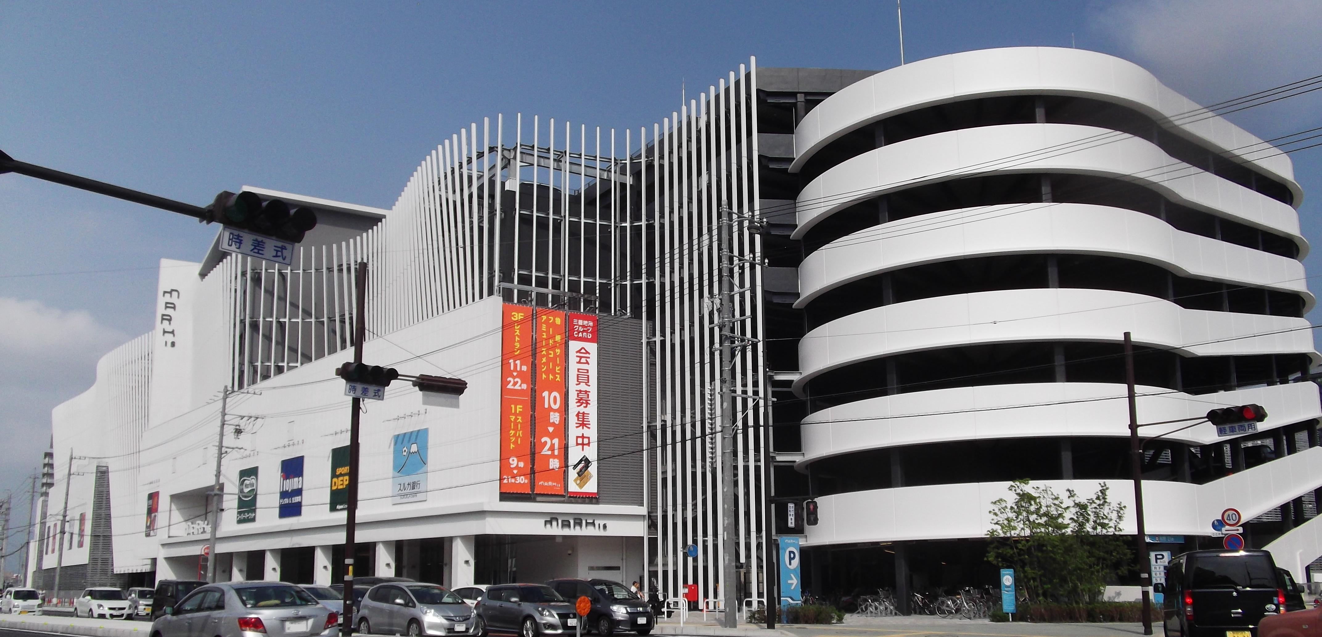 マークイズ静岡外観